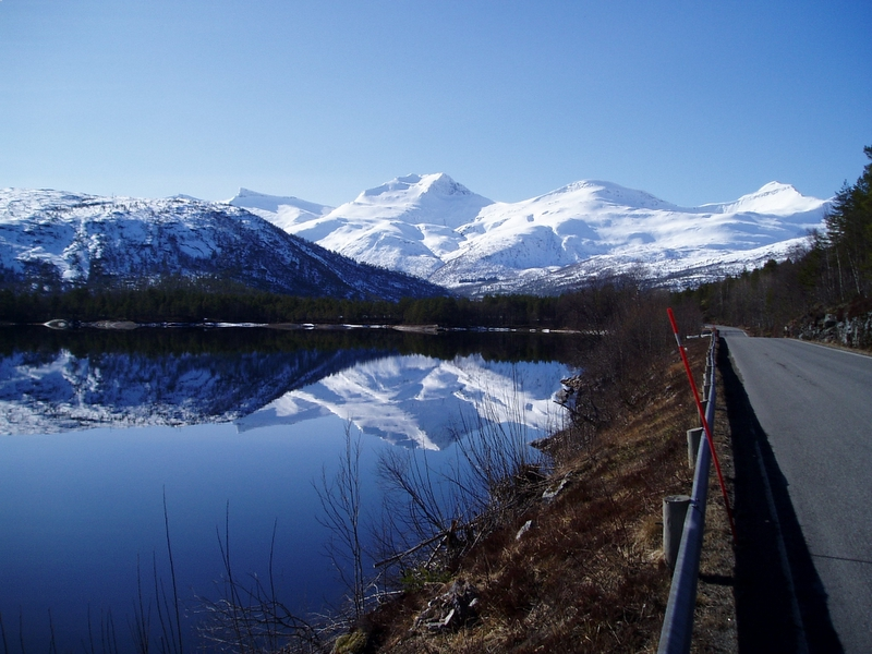 Motiv fra E6 like før Tømmernes, Nordland. Translation Photo from E6 just before Tømmernes, Nordland, Norway.